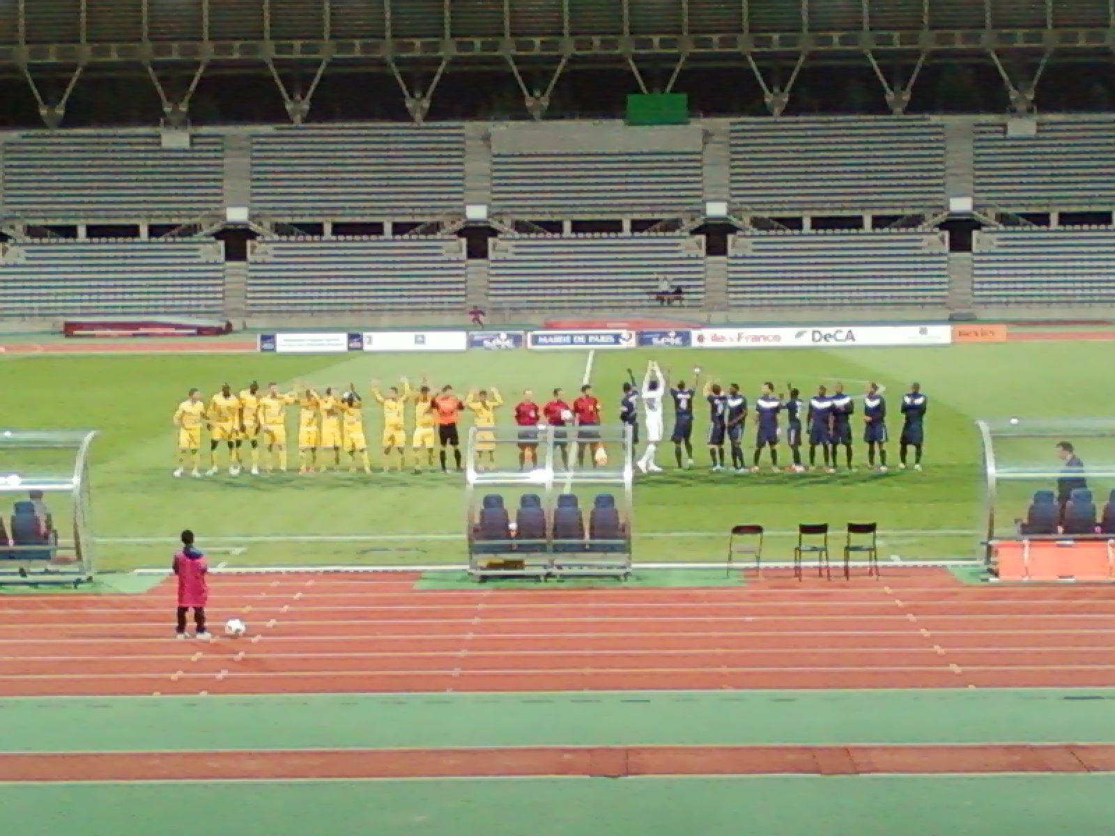 Présentation des équipes lors du match Paris FC - Epinal du 12 octobre 2011 au Stade Charléty